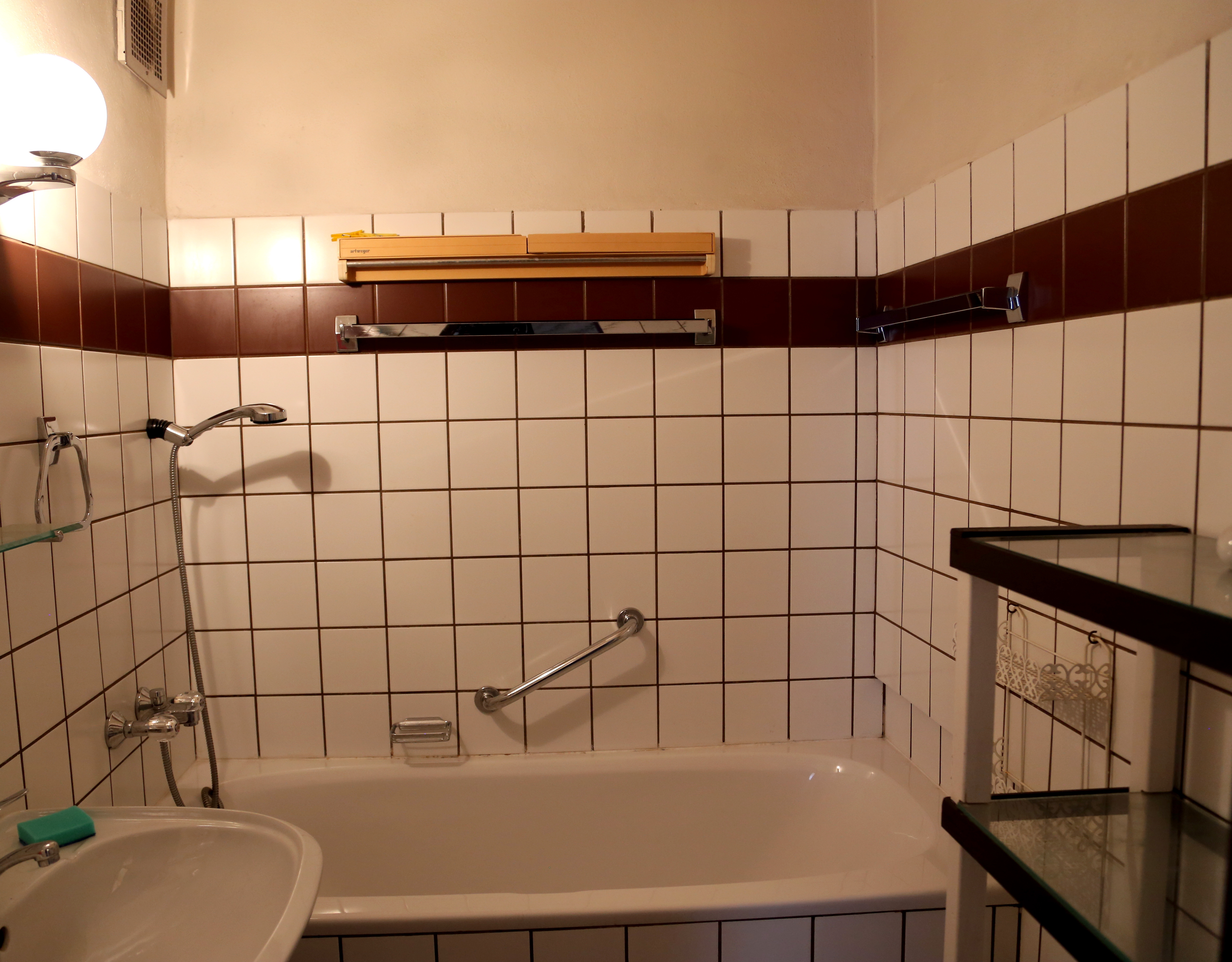 Mňačkův byt - koupelna